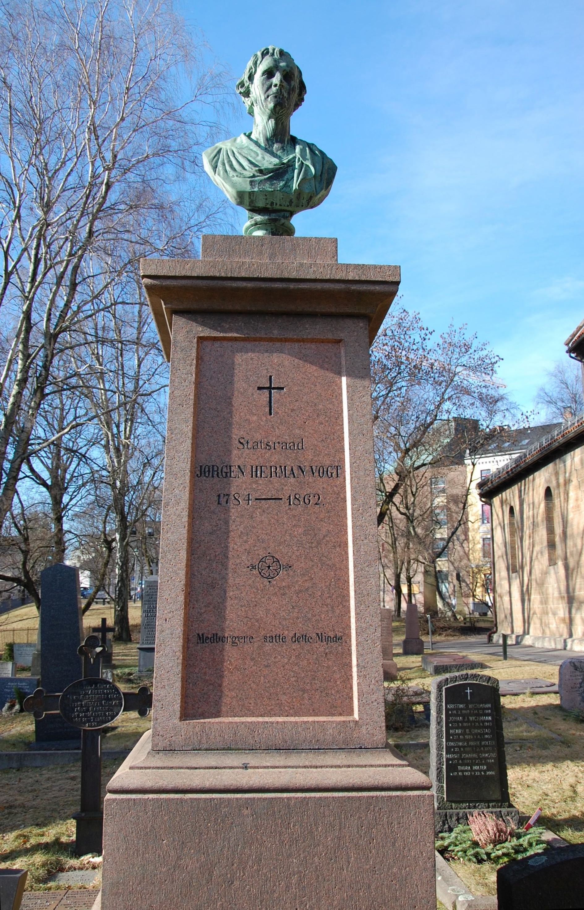 Jørgen Herman Vogt, gravminne på Gamle Aker kirkegård, Oslo